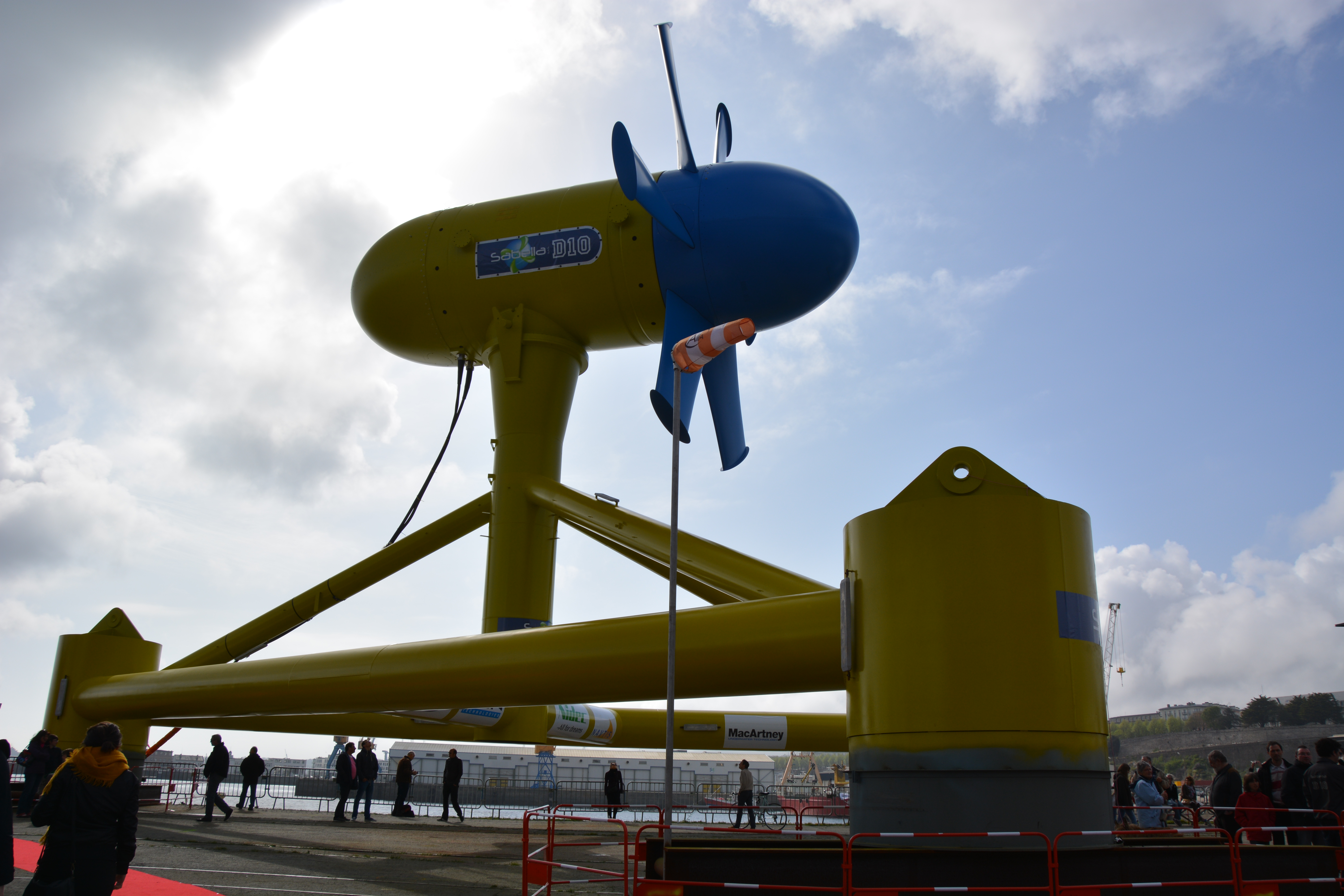 Démonstrateur hydrolienne Sabella D10 à Brest lors des portes ouvertes